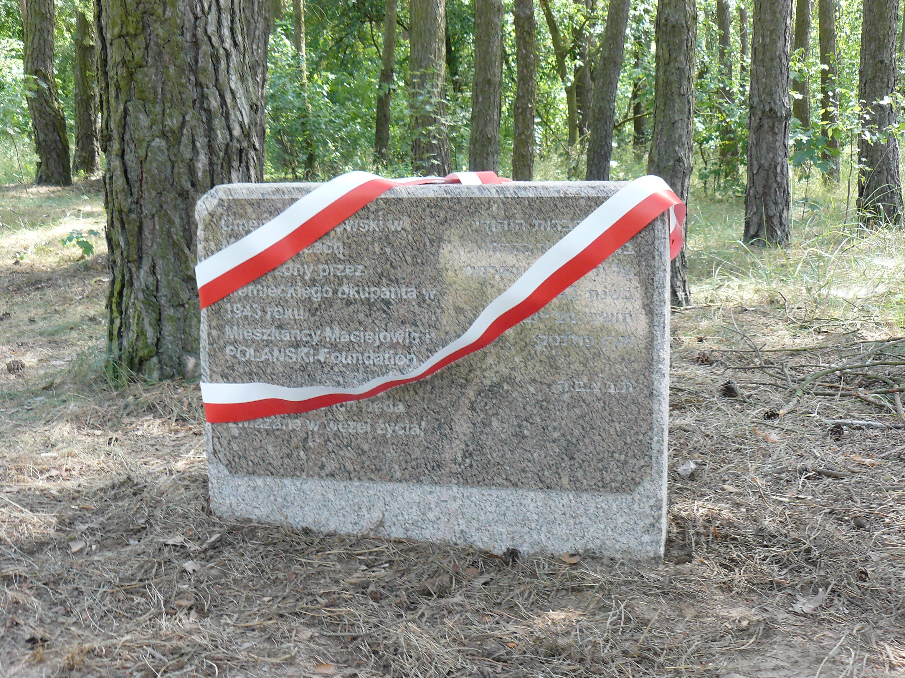 Pamiątkowy kamień odsłonięty w czerwcu 2019 na cmentarzu żydowskim w Maciejowicach.